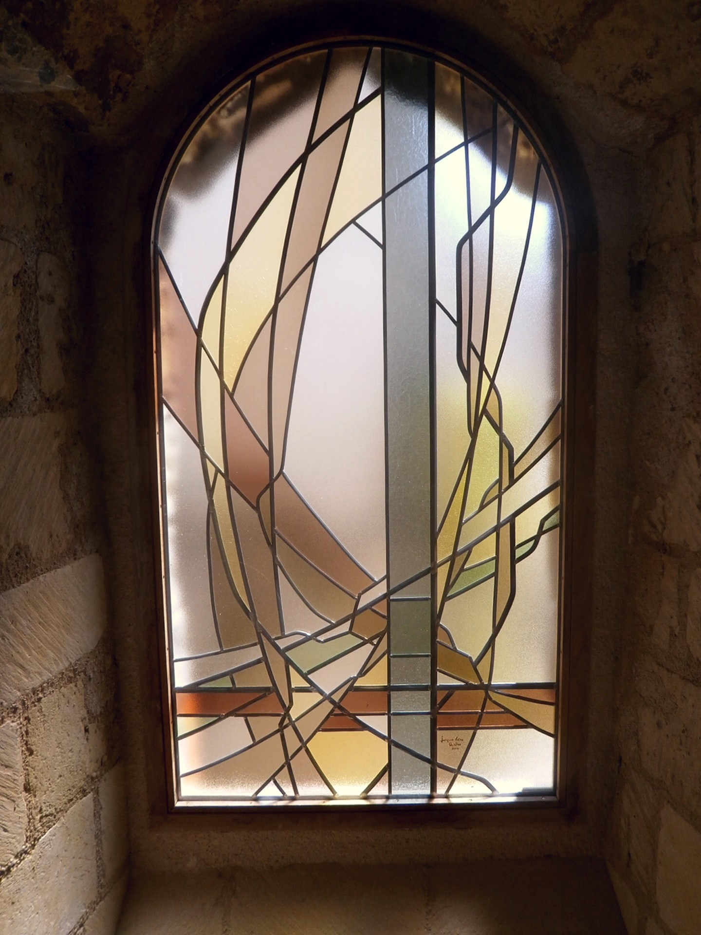 Un vitrail moderne de la chapelle